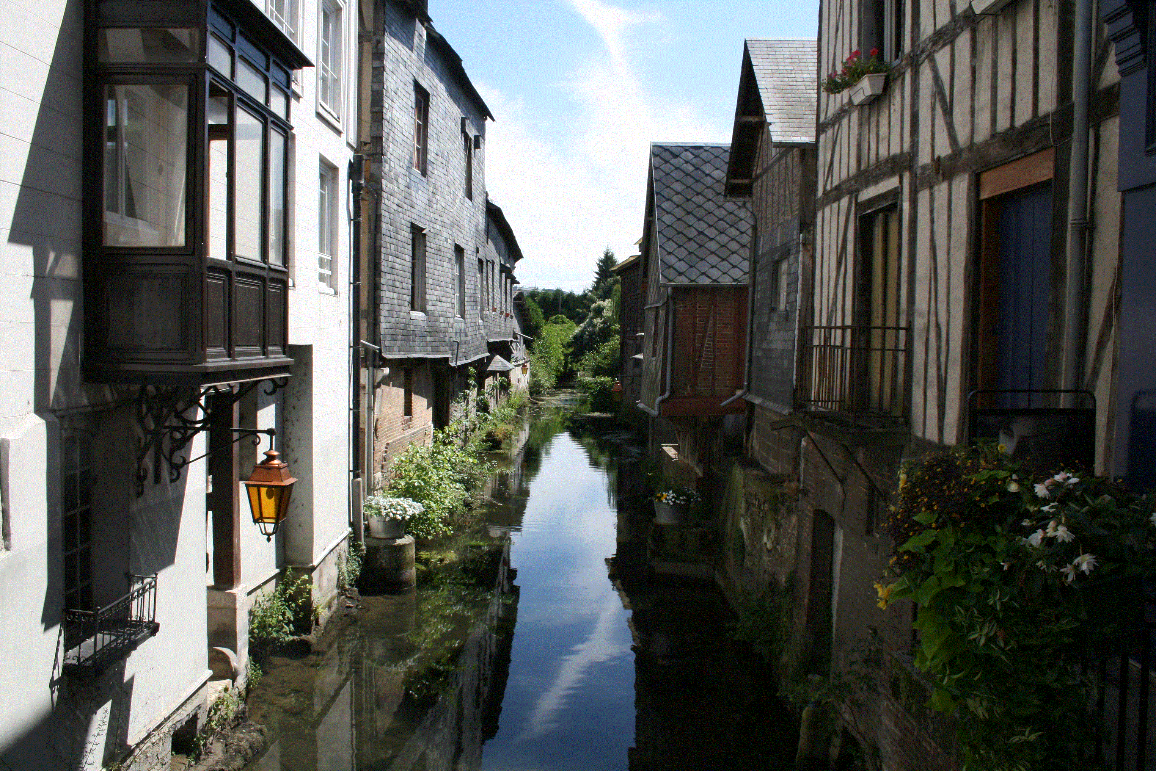 Pont Audemer stroompje